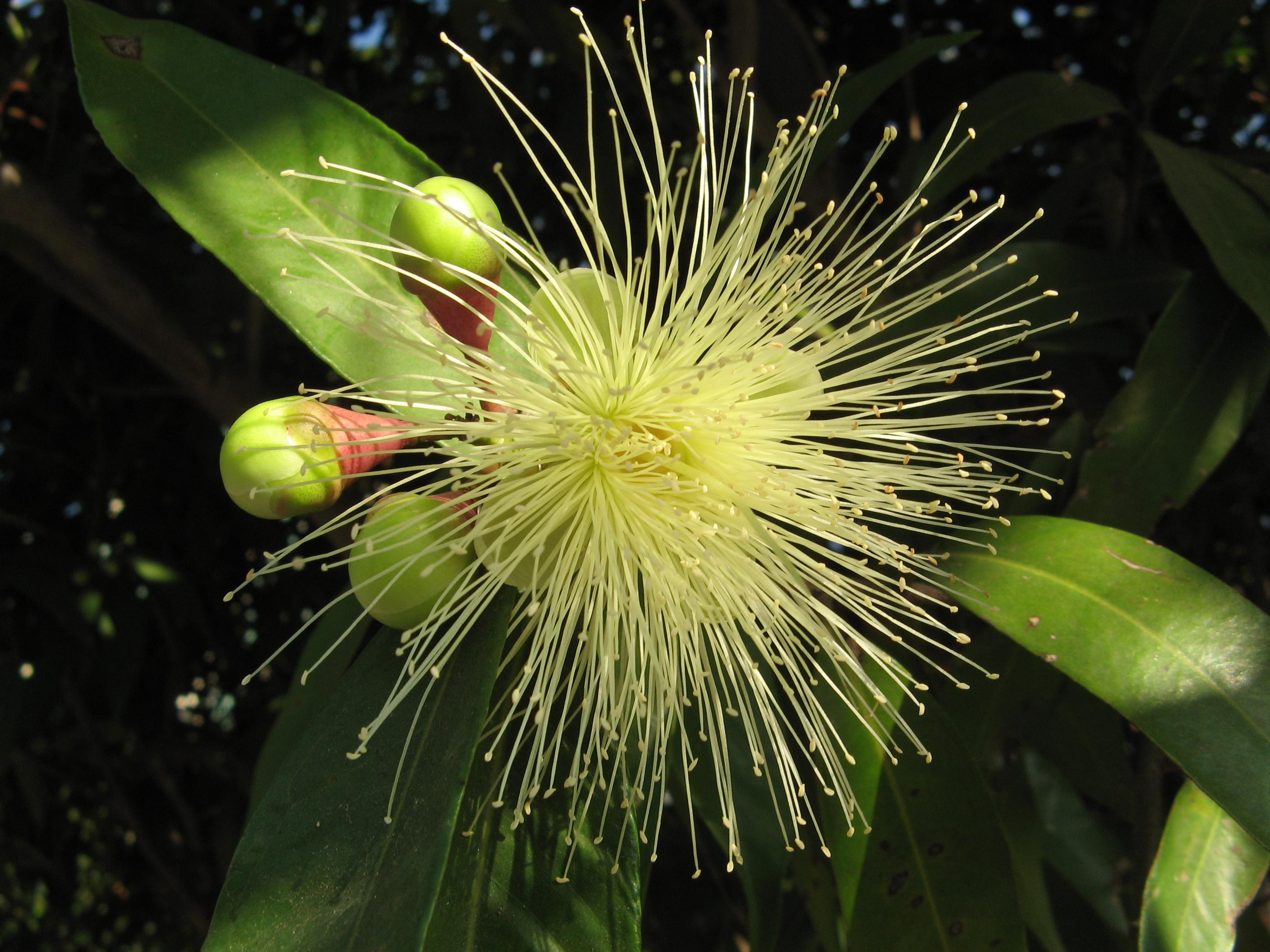 flor de andiroba (Carapa guianensis)